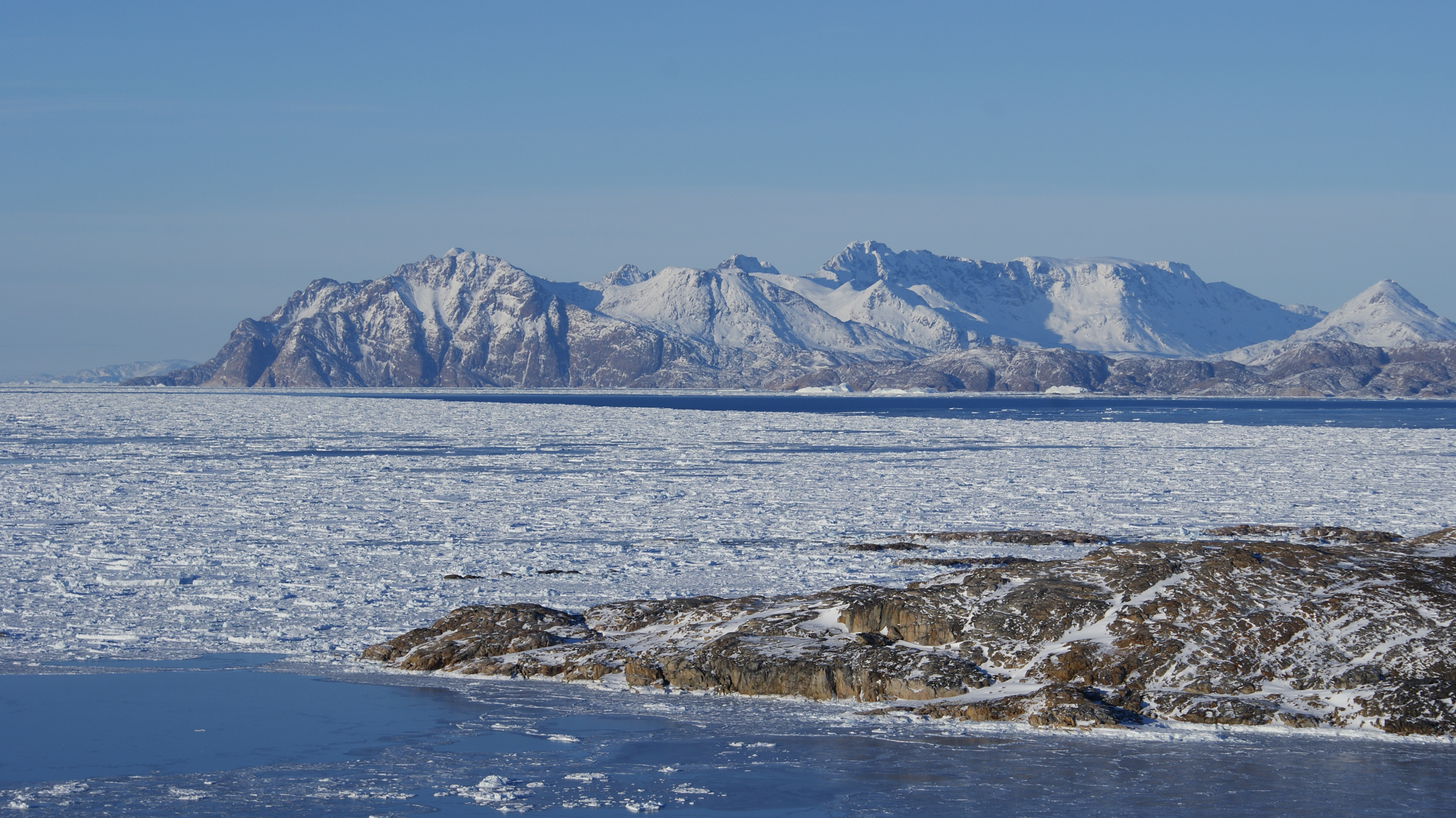 Ammassalik Island, Greenland, seen from Kulusuk Island.